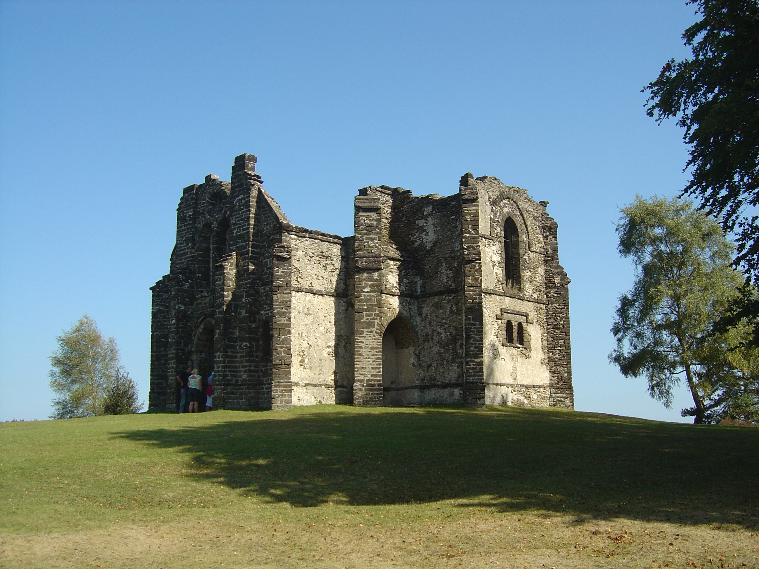 Chapelle du Mont Gargan édifiée entre 1868 et 1871